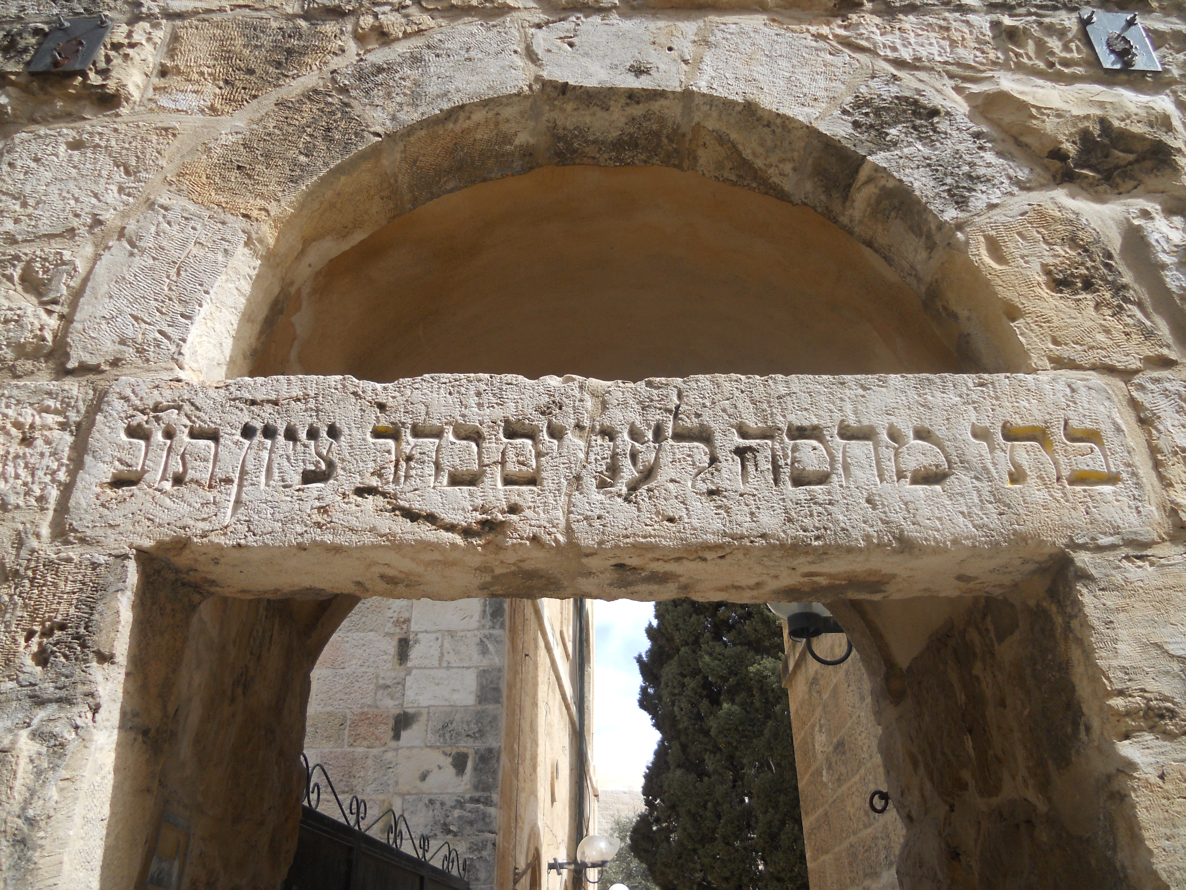 שער הכניסה לכיכר בתי מחסה. בכיתוב 'בתי מחסה לעניים בהר ציון תוב'